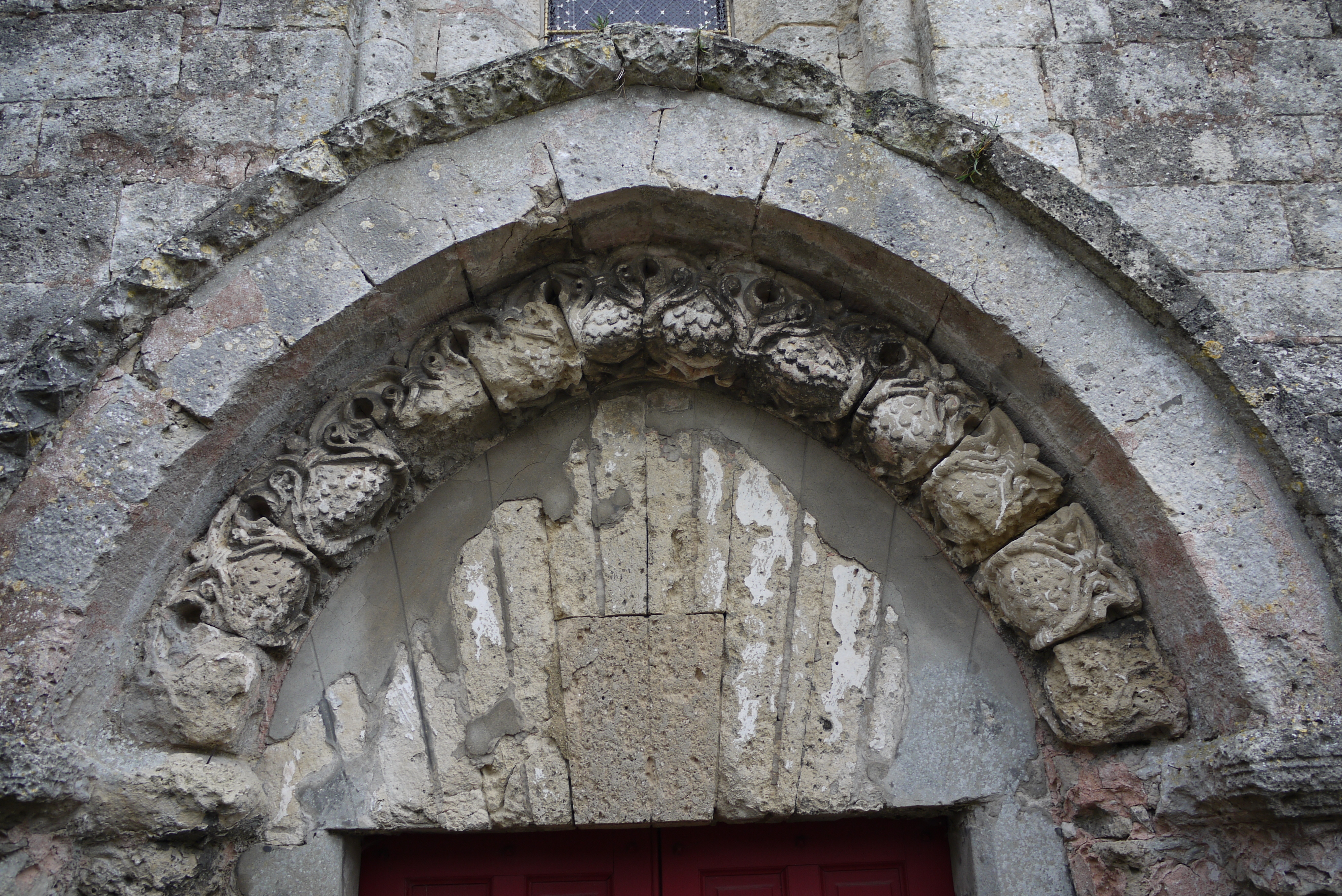 Église saint pierre de Cerseuil